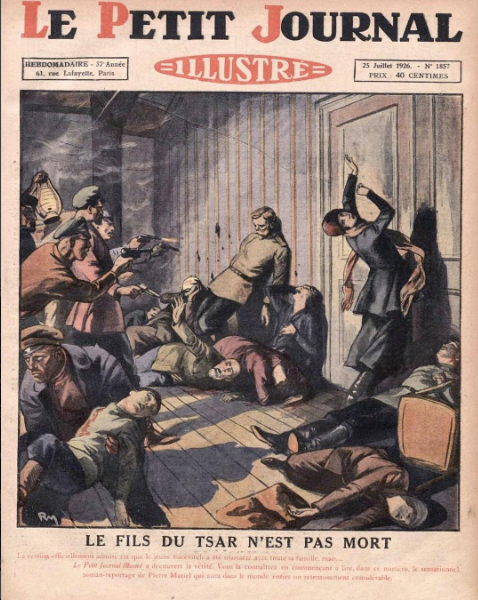 Сцена расстрела царской семьи на обложке Le Petit Journal, 1926 Иллюстрируется версия "Царевича спасли" -- видите, в левом нижнем углу монархист уносит явно еще живого мальчика?